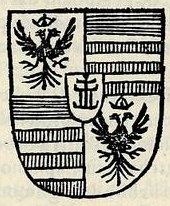 Stemma della famiglia Boschetti